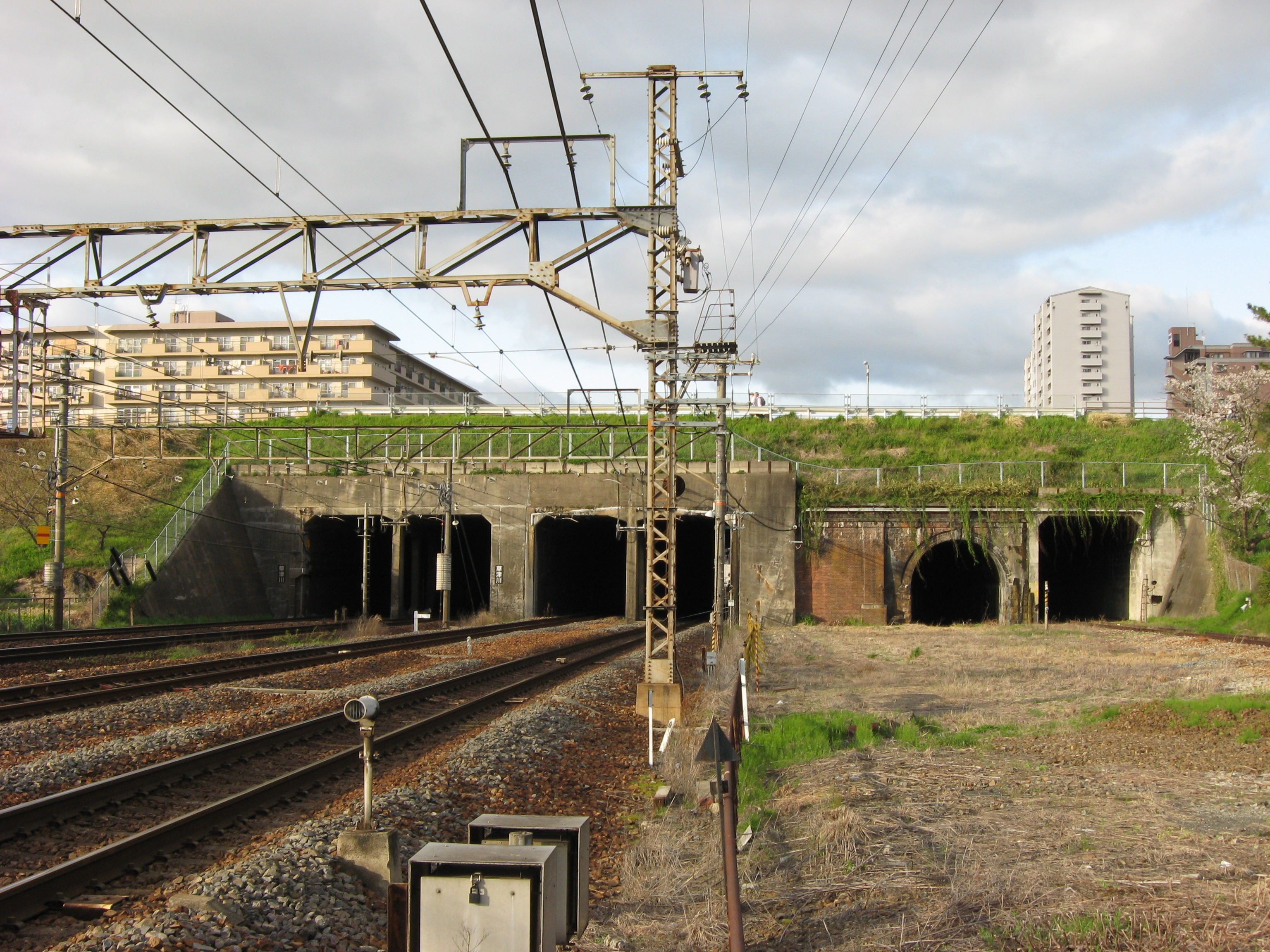 JR West Biwako Line Kusatsugawa (jawp) Tunnel, in Kusatsu, Shiga, Japan.